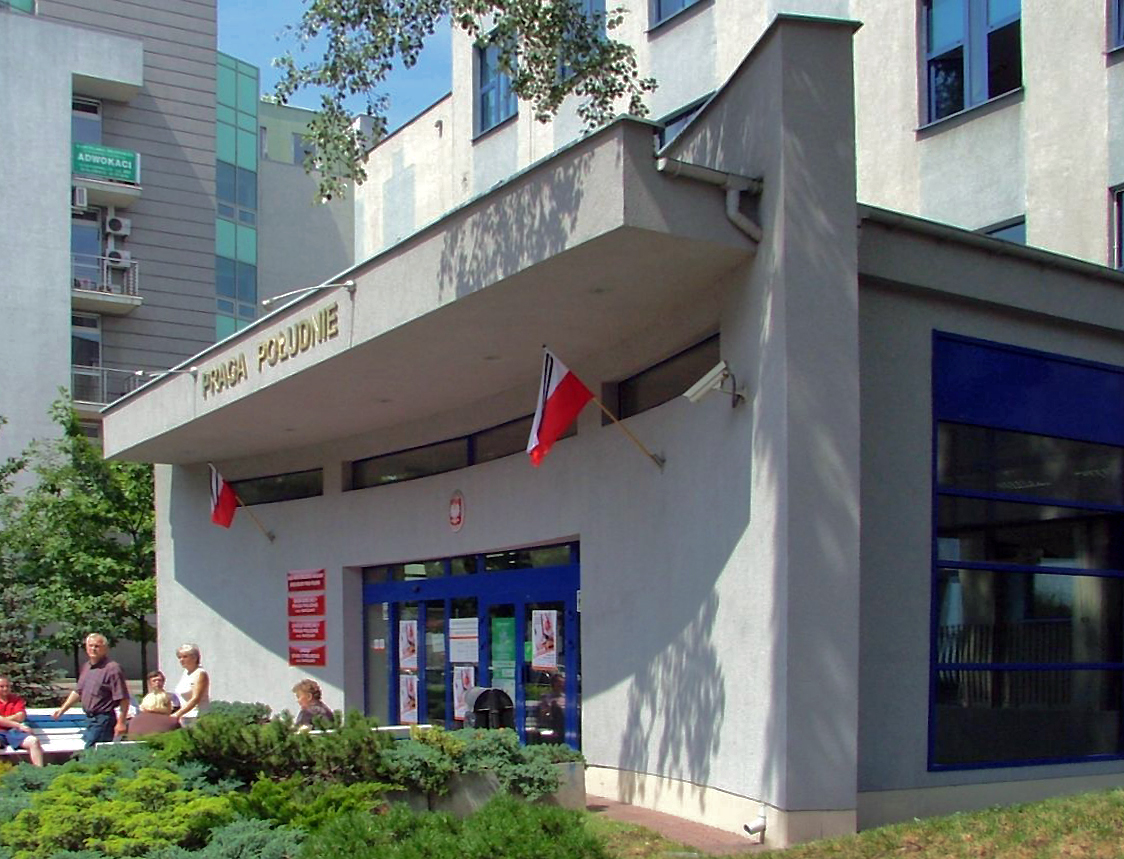 Urząd Dzielnicy Praga Południe. Flagi przepasane kirem po wprowadzeniu przez Lecha Kaczyńskiego żałoby narodowej, po katastrofie polskiego autokaru w Grenoble we Francji (22 lipca 2007 ok. godz. 9:30)